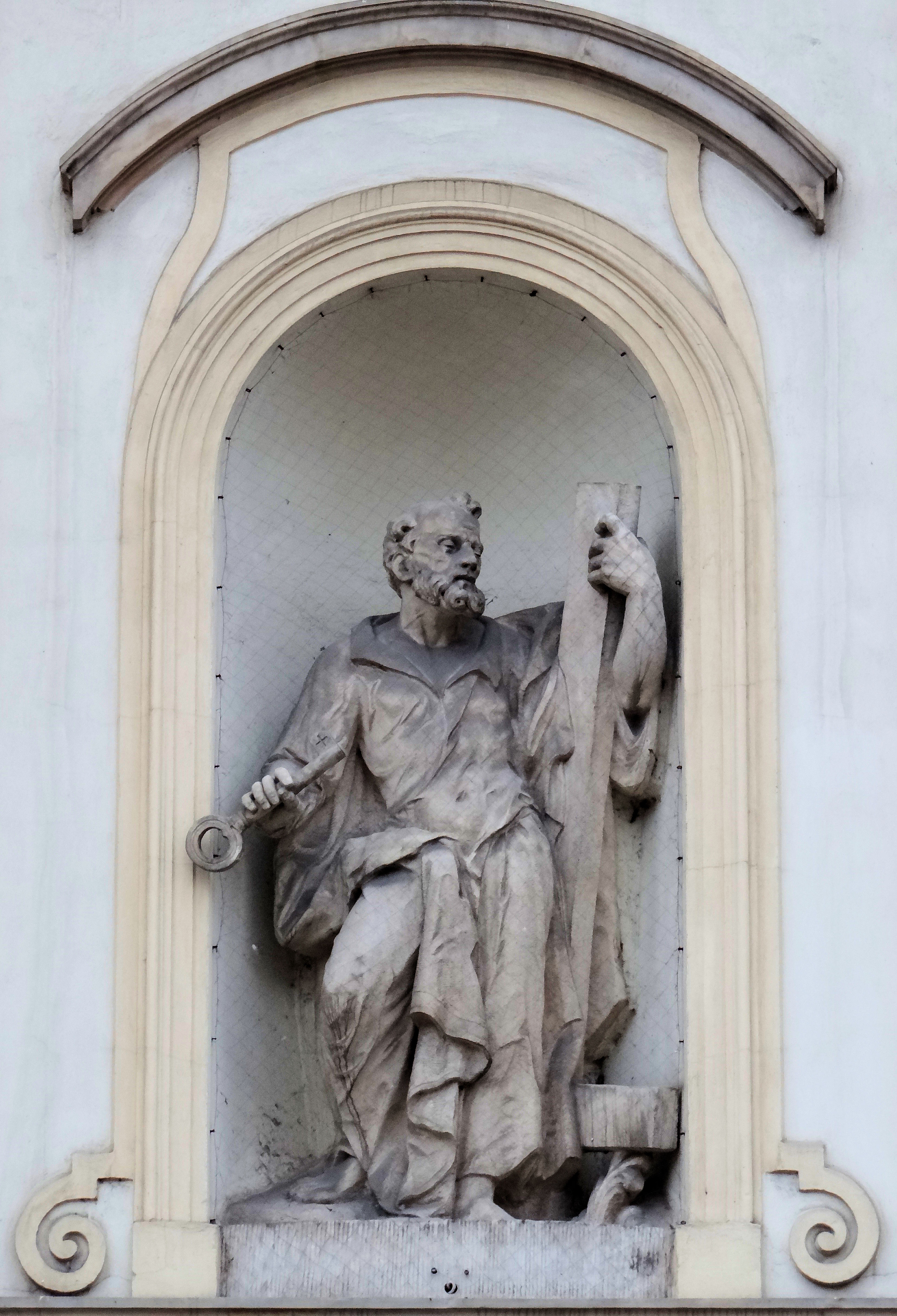 Kościół p.w. Świętego Krzyża na Krakowskim Przedmieściu w Warszawie - figura świętego